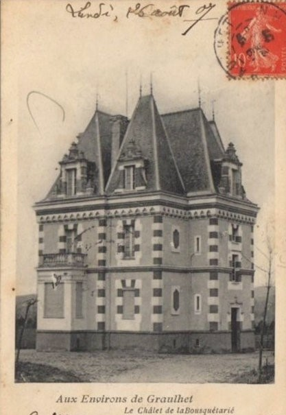 Le manoir de la Bousquetarié, Graulhet, Tarn, tel qu'il était en 1907. Aujourd'hui, il est ruiné